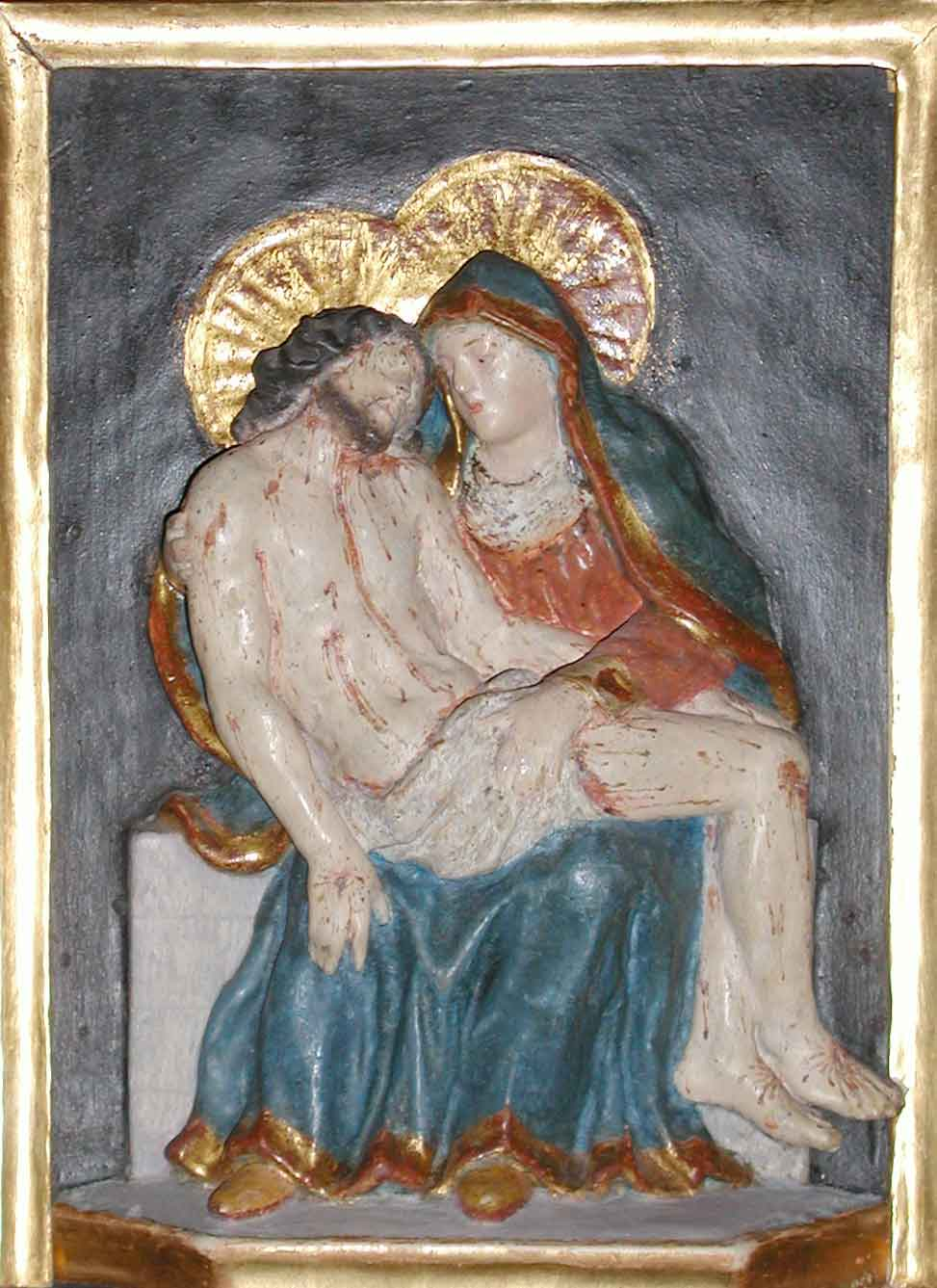 Polichrome Pietà dated 1717 signed Martin Vinazer (1674 - 1744 in St. Ulrich in Gröden)